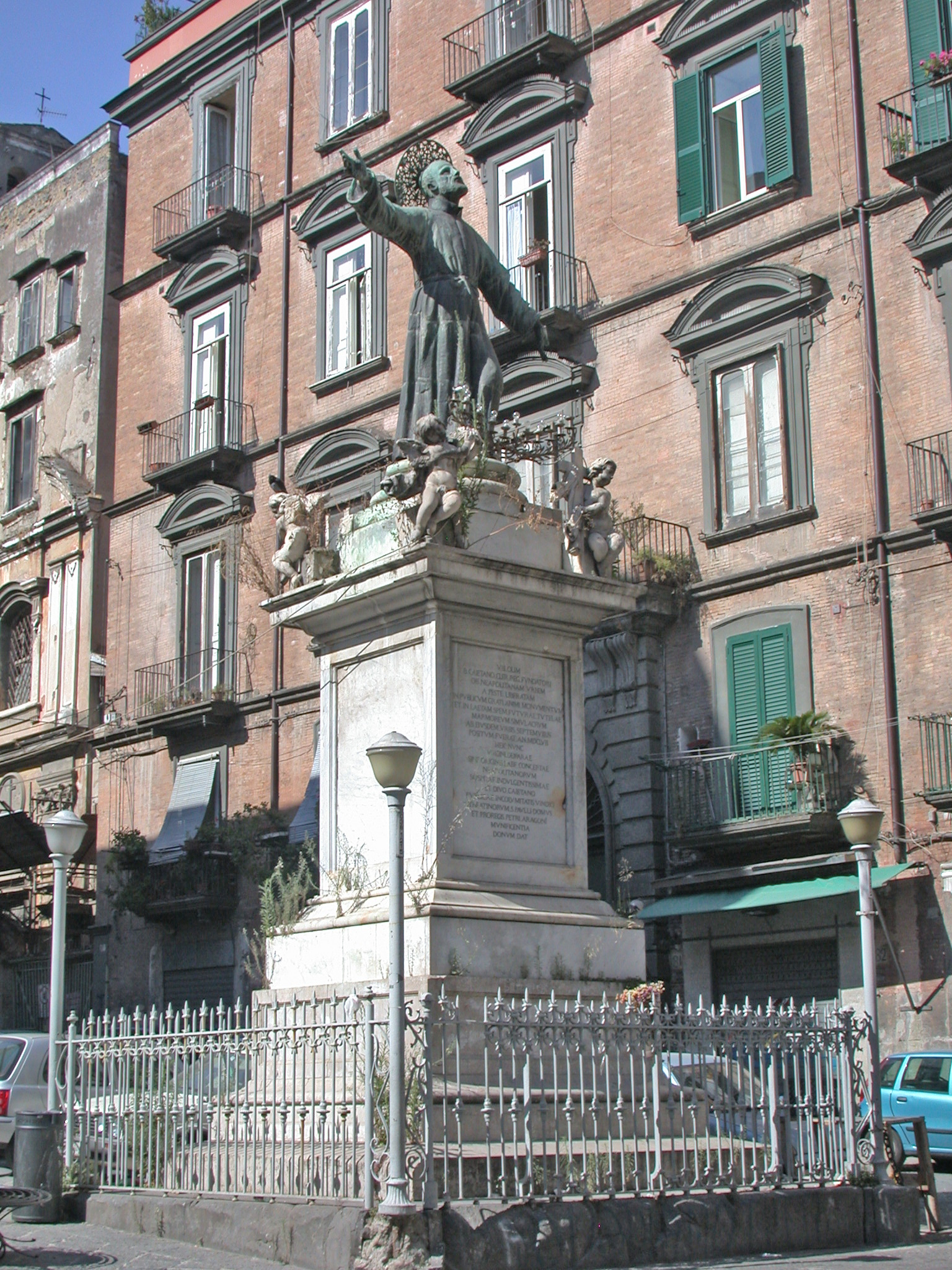 Italia, regione Campania, Napoli, monumento a san Gaetano, nella piazza omonima, presso le chiese di San Paolo Maggiore e di San Lorenzo Maggiore.